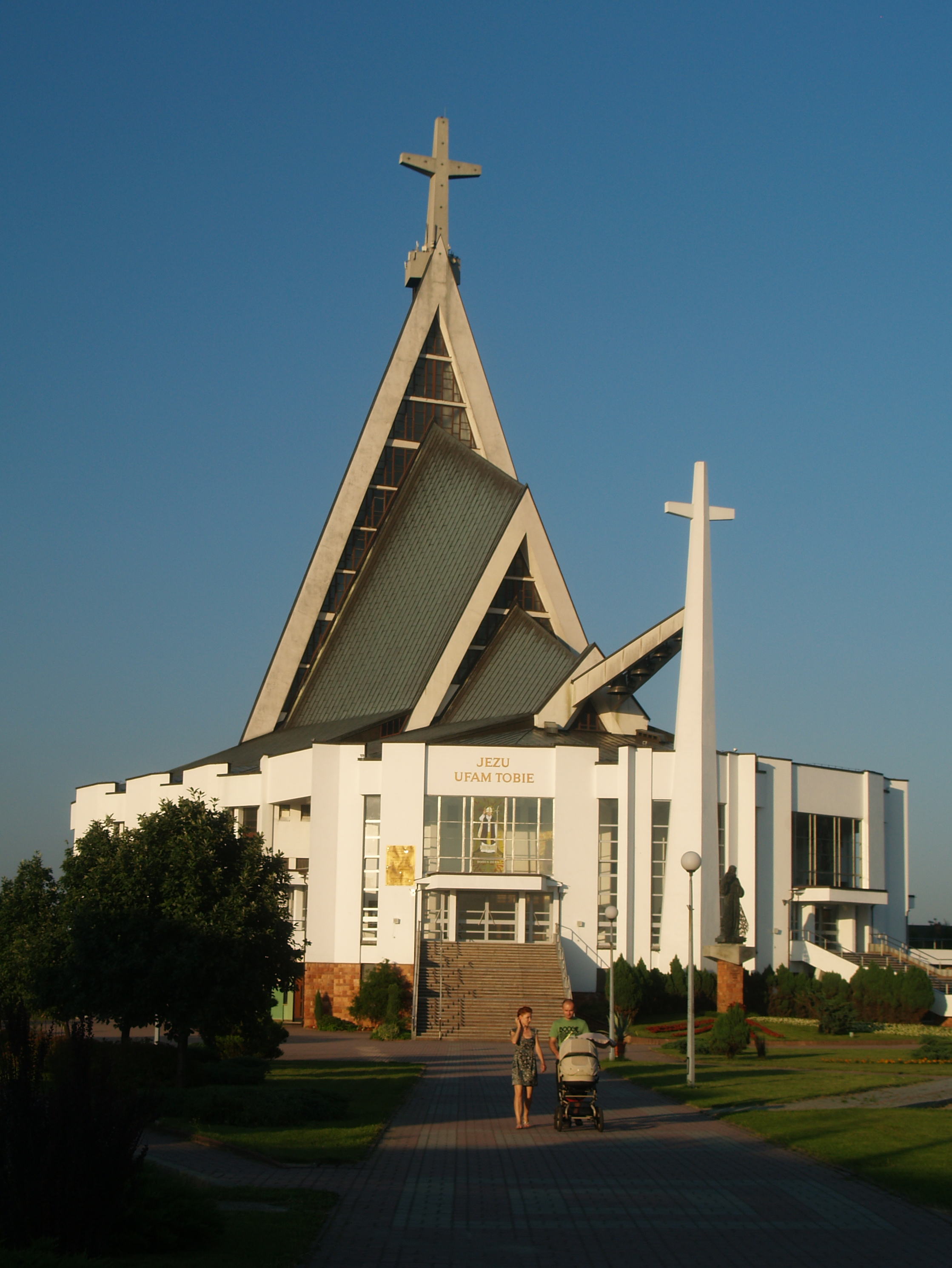 Kościół Miłosierdzia Bożego w Dębicy